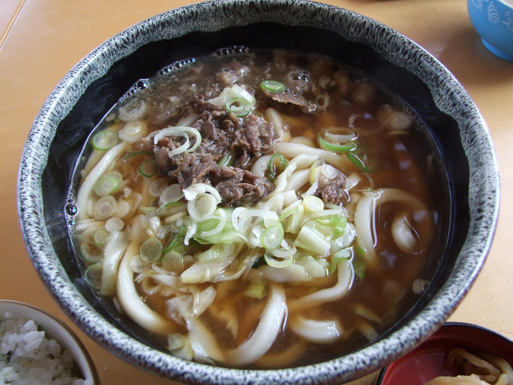 道の駅「富士吉田」で食べた「吉田うどん」です。コシのある麺、そしてキャベツにびっくりです。